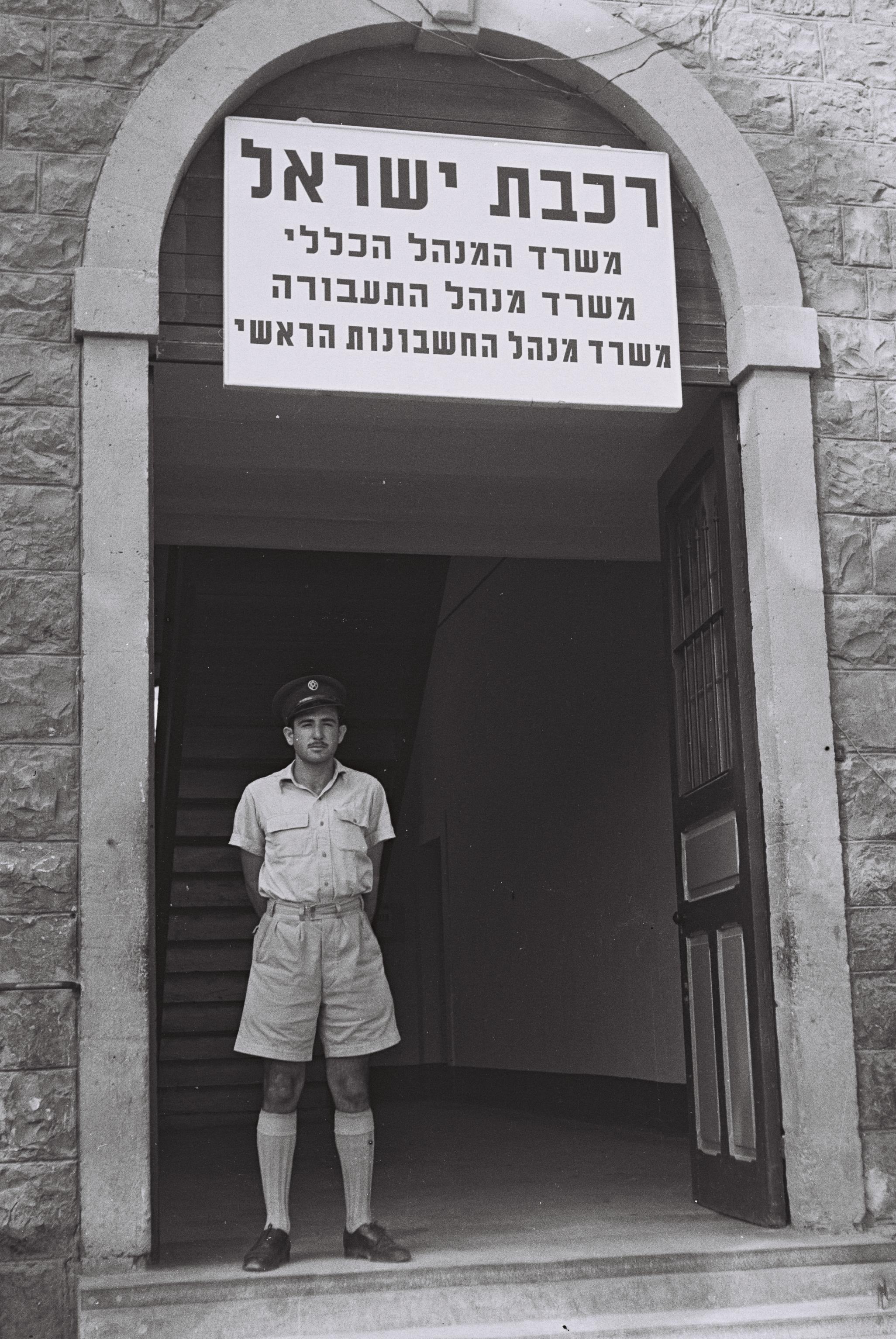 הכניסה למשרדי הנהלת רכבת ישראל בחיפה בשנת 1948